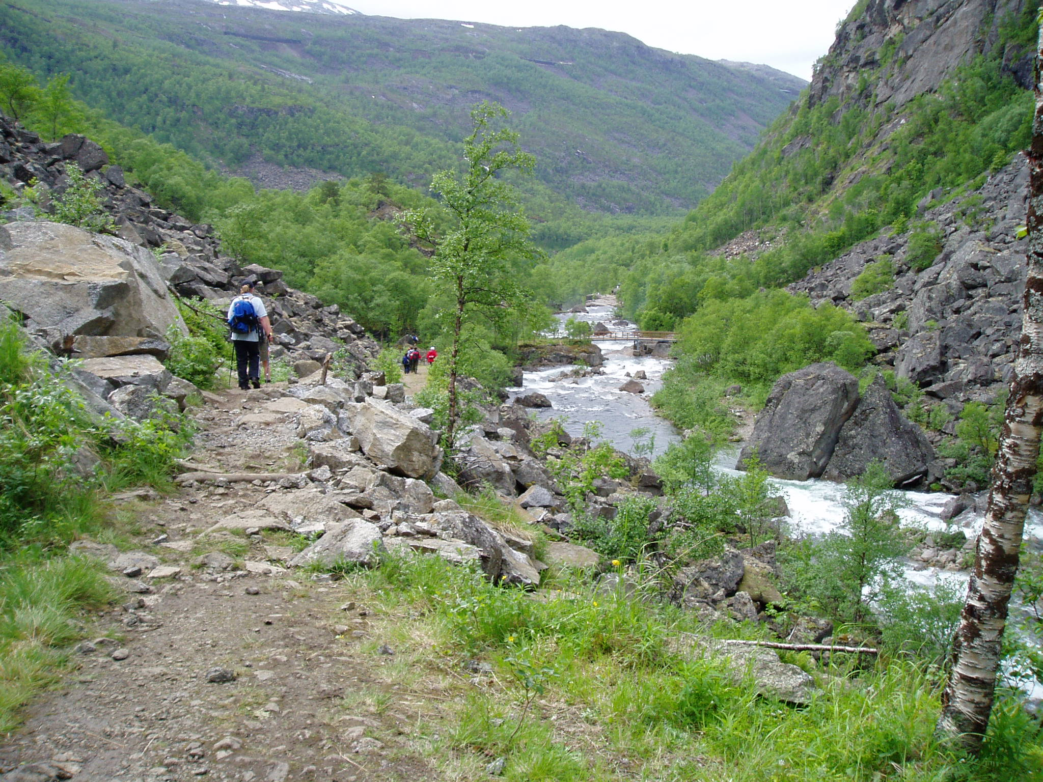 Rallarveien langs Ofotbanen, ved Rombakselva.